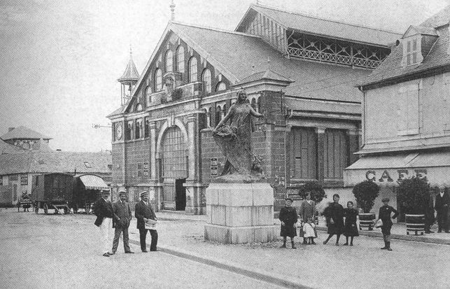 Halle aux grains et Druidesses disparues (Lannemezan, Hautes-Pyrénées, France)